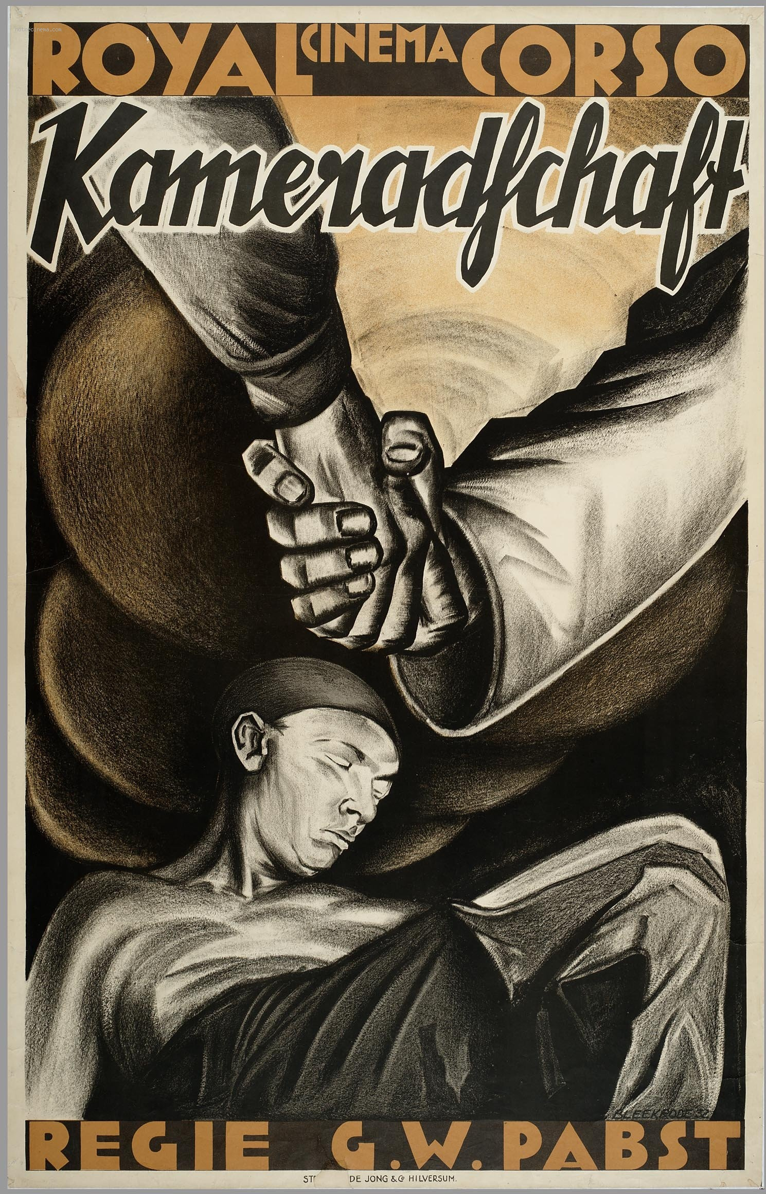 Affiche néerlandaise du film Kamaradschaft (La Tragédie de la mine) de Pabst, signée Meijer Bleekrode (1896-1943).